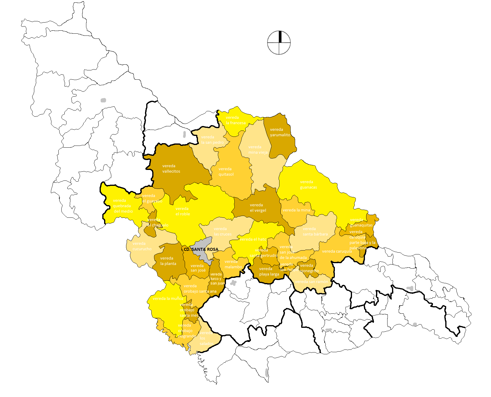 Veredas de la cabecera urbana, Santa Rosa de Osos